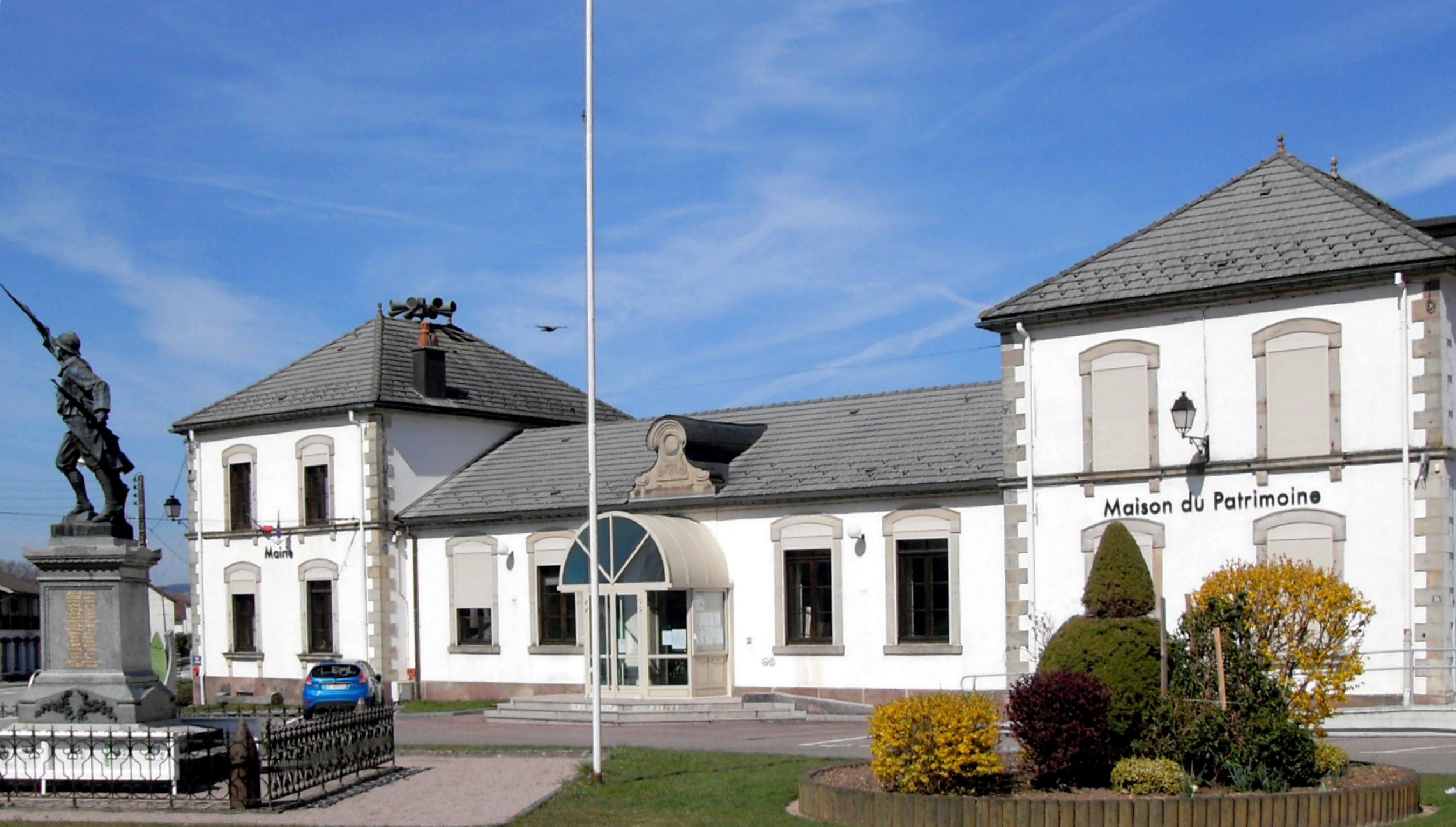 La mairie et la maison du patrimoine de Dommartin-lès-Remiremont